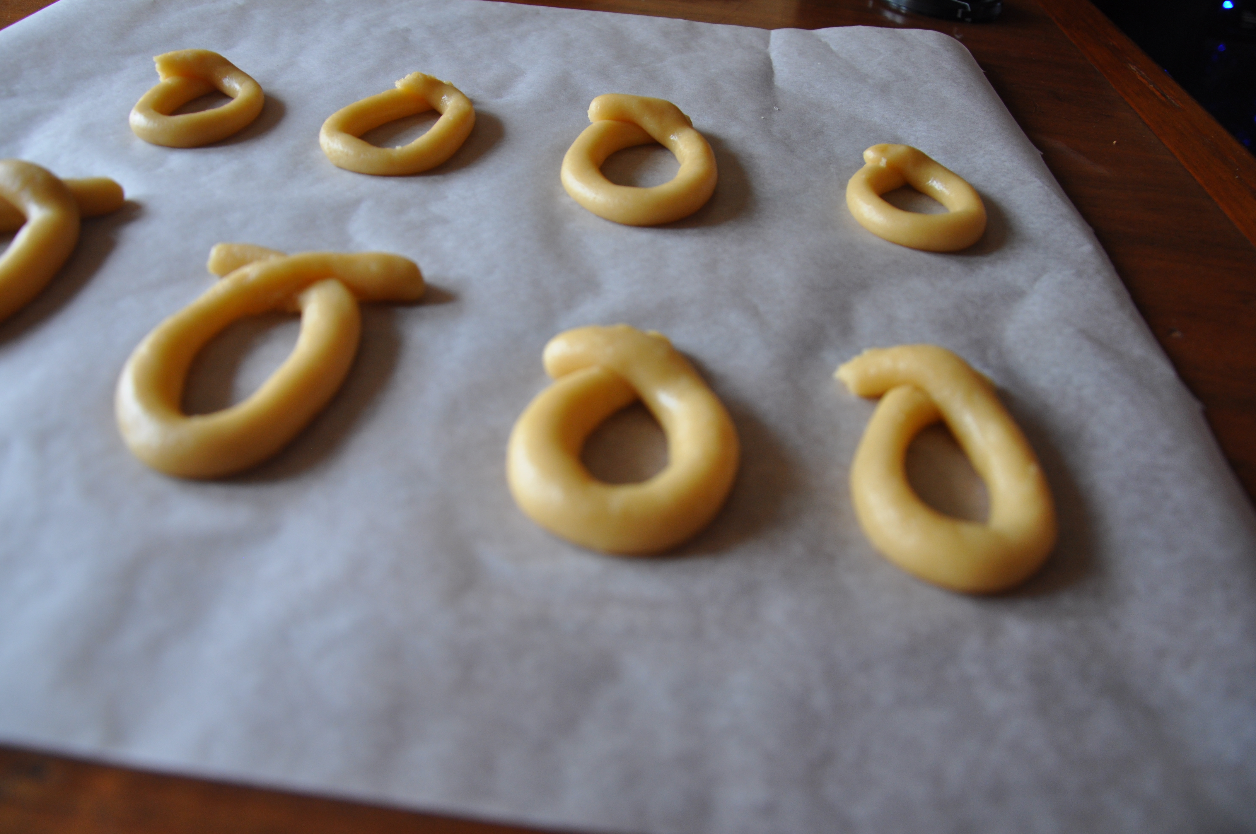 Rollos de San Antón antes de freírlos.